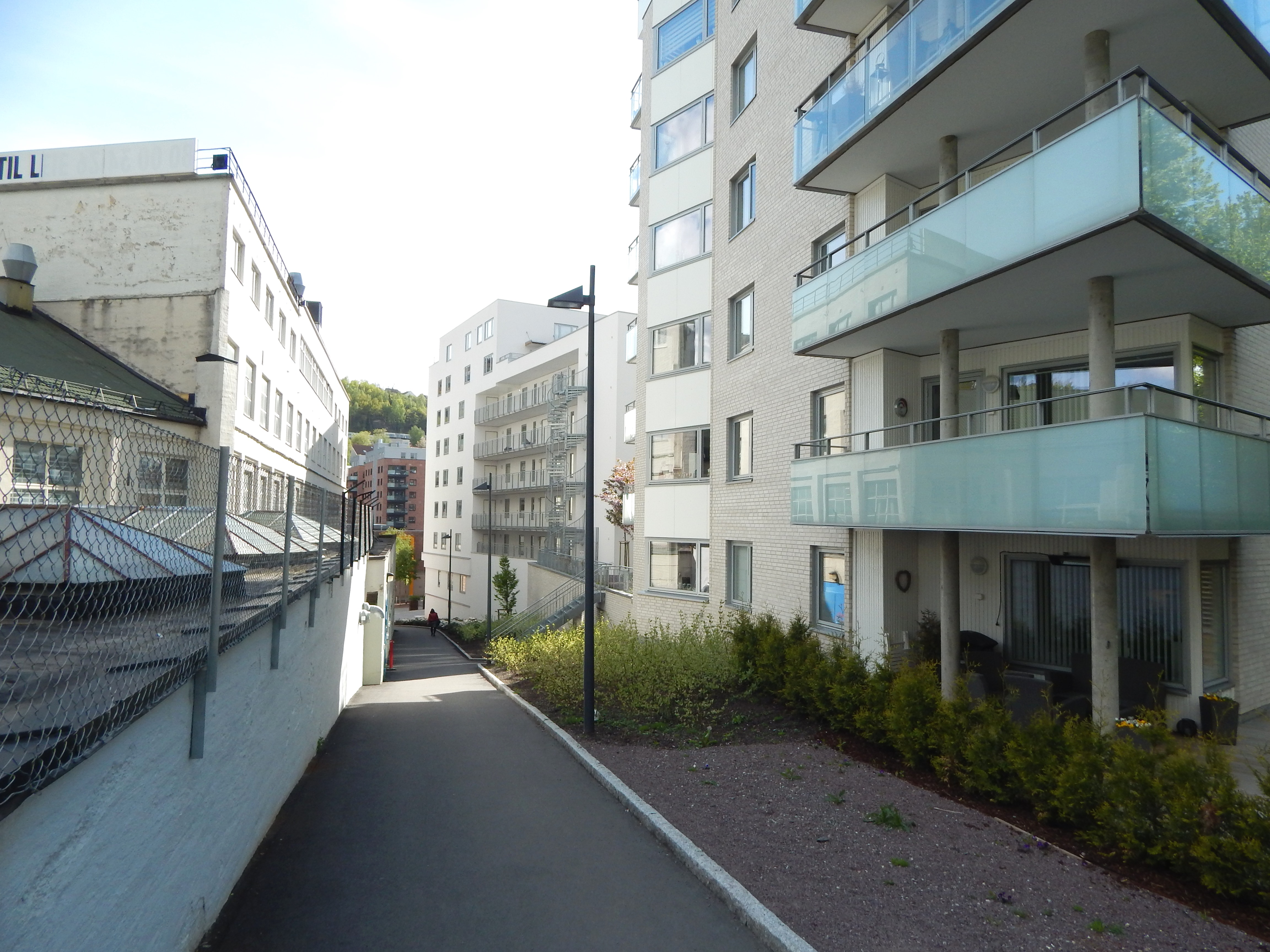 Støperibakken i Kværnerbyen